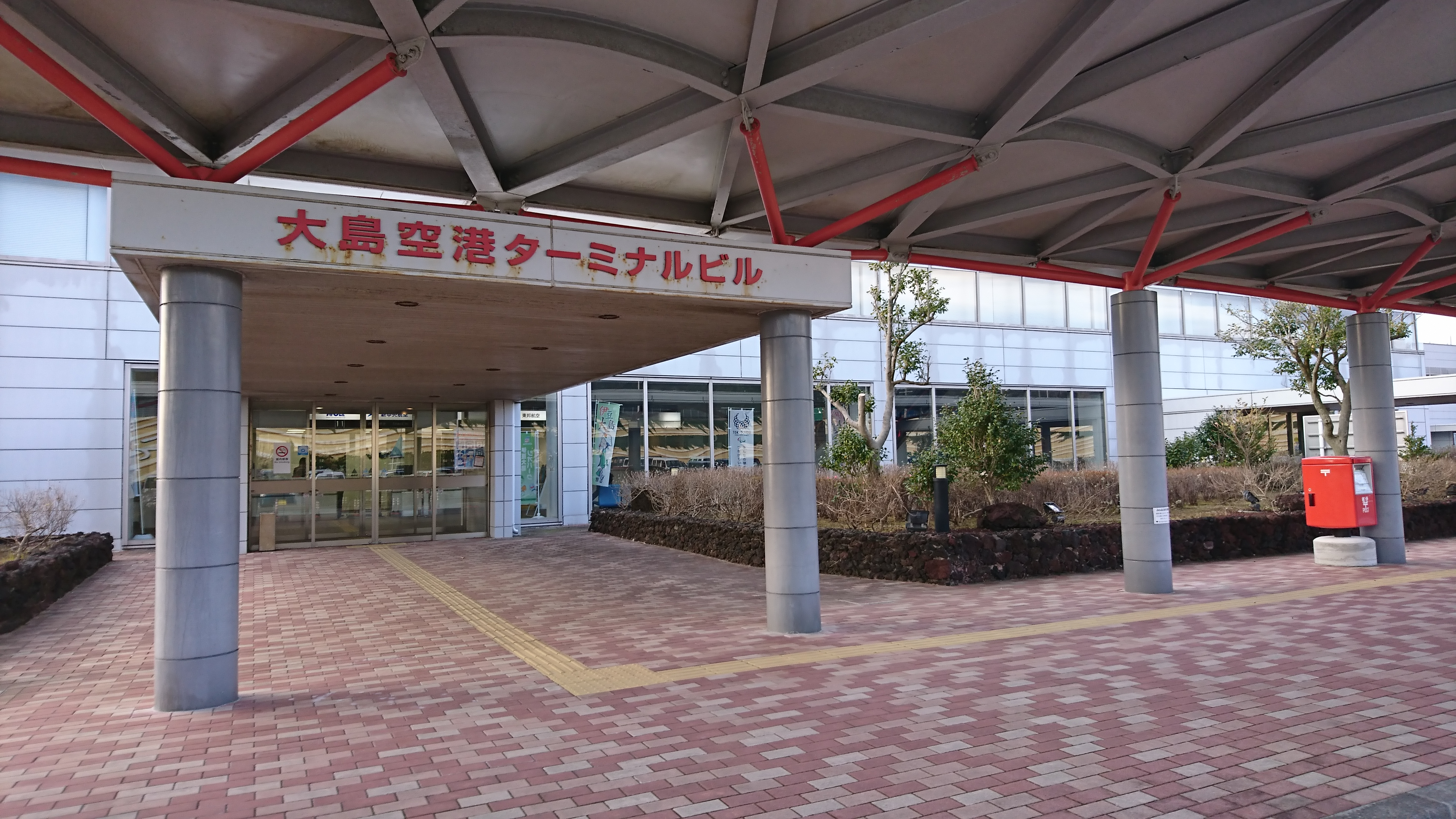 大島空港ターミナルビル出入口